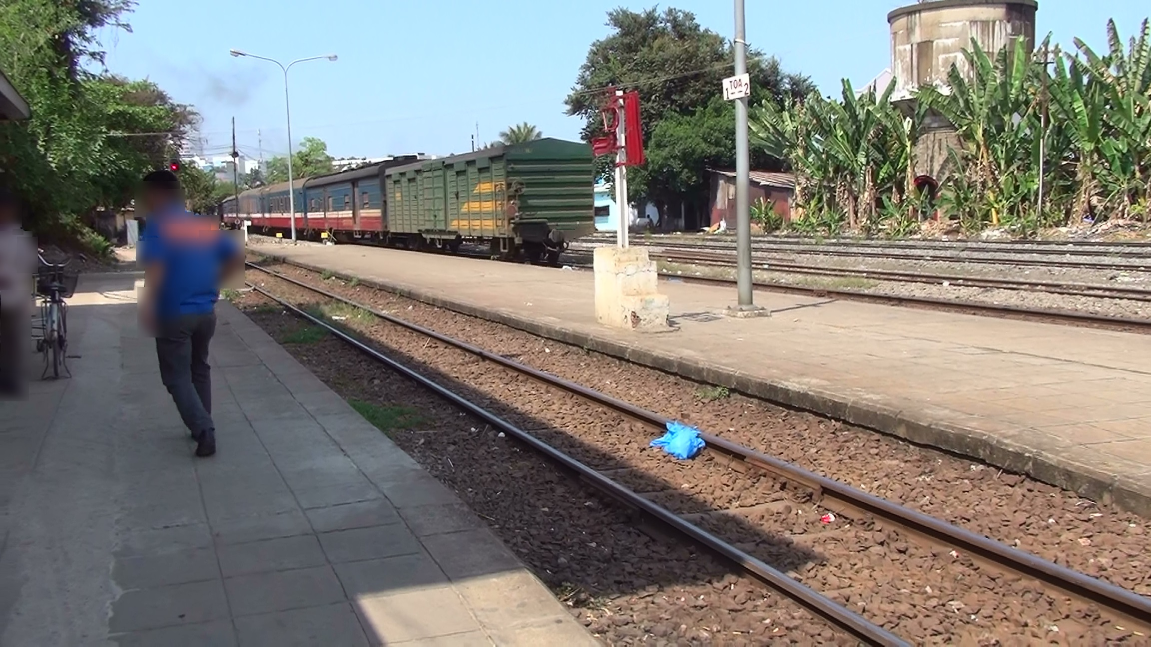 ベトナム南北統一鉄道ビエンホア駅をハノイ方面に発車する普通列車